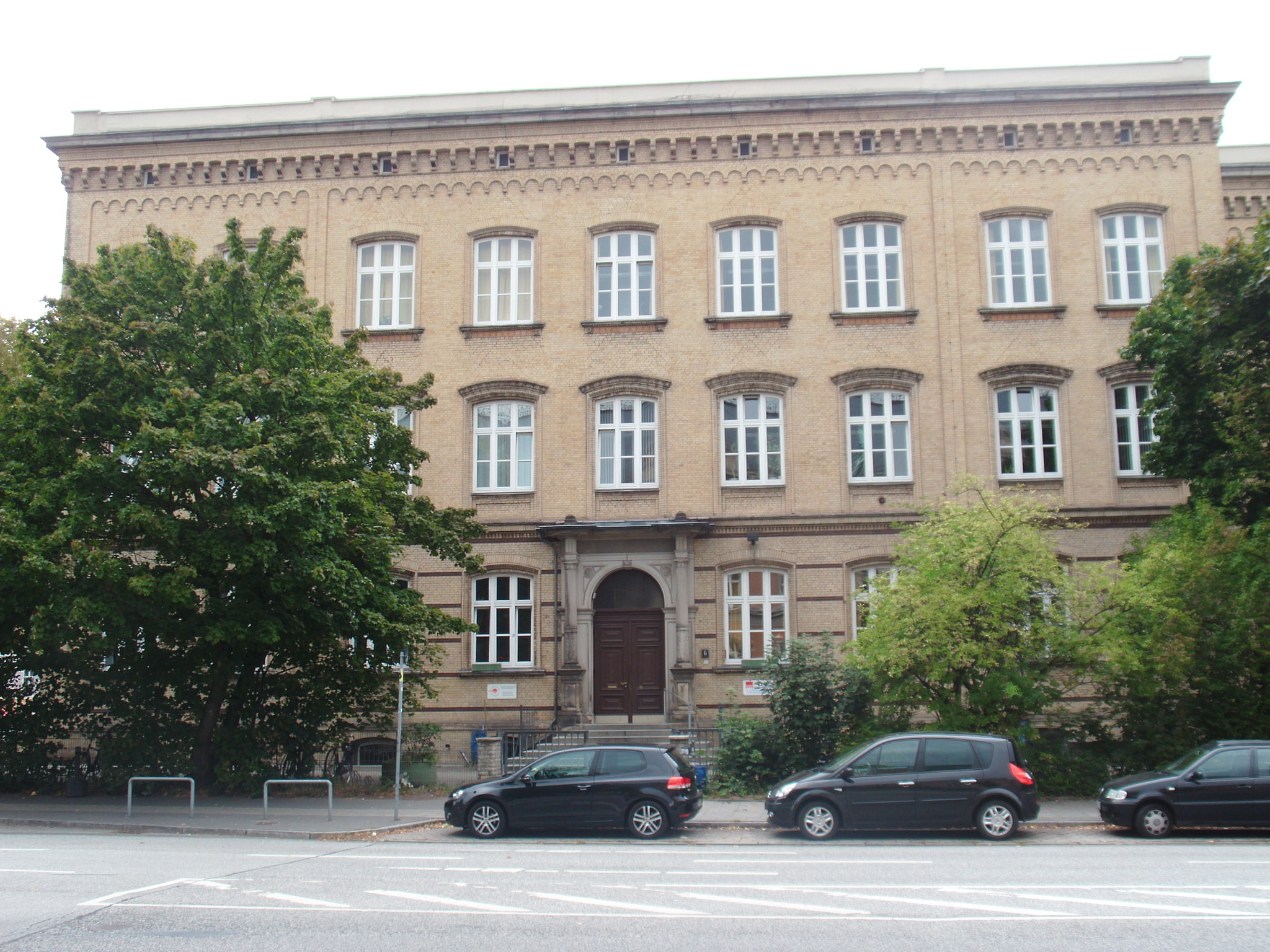 ehemalige Albrecht-Thaer-Schule, erbaut 1876/78This is a photograph of an architectural monument.